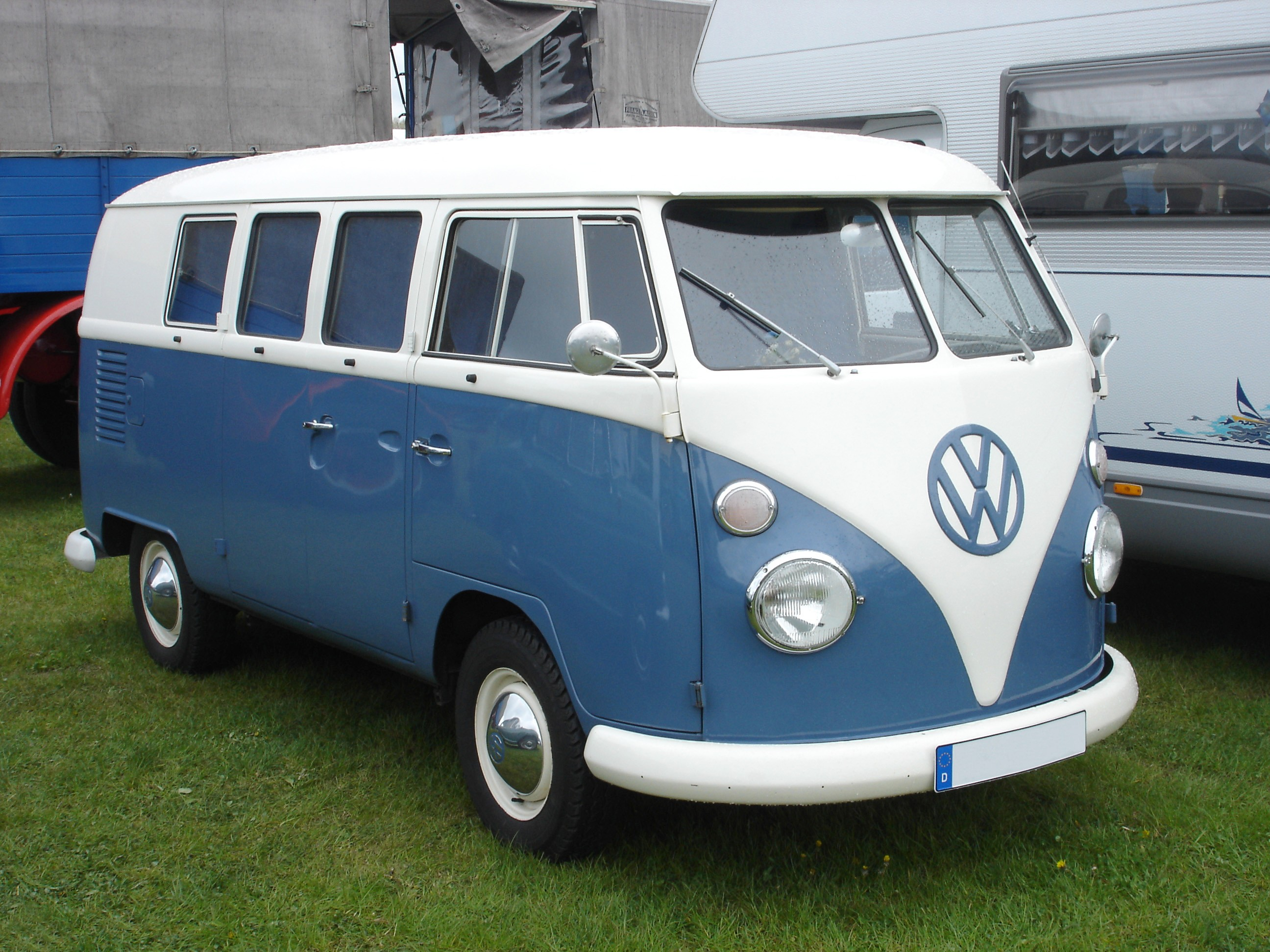 VW Transporter T1b Kleinbus Normalausführung